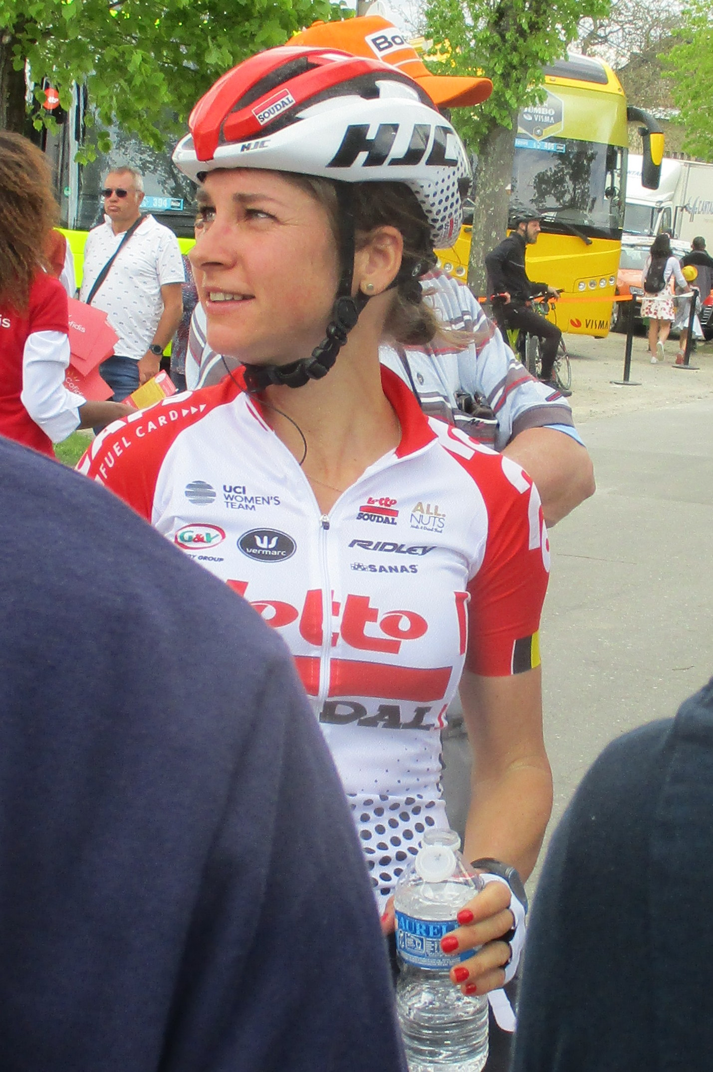 Finish van de Waalse Pijl 2019 voor vrouwen op de Mur de Huy